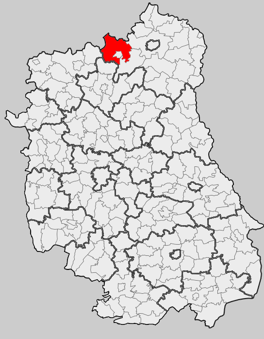 Map of gmina Międzyrzec Podlaski (rural), Biała Podlaska county, Lublin voivodship Mapa gminy Międzyrzec Podlaski (wiejska), powiat bialski, województwo lubelskie